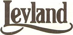 Leyland-Logo